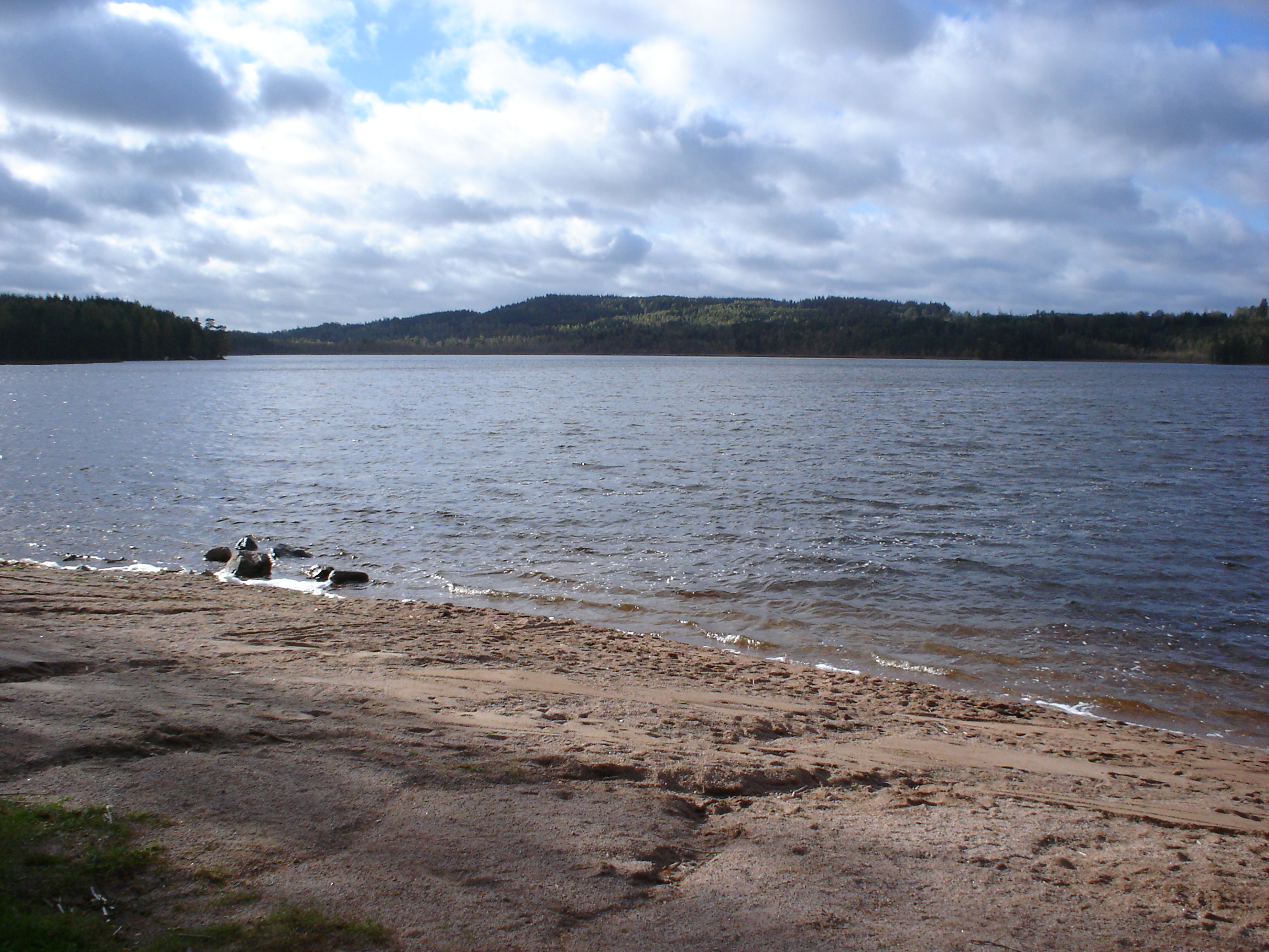 Sjön Söljen, som ligger i Aneby kommun